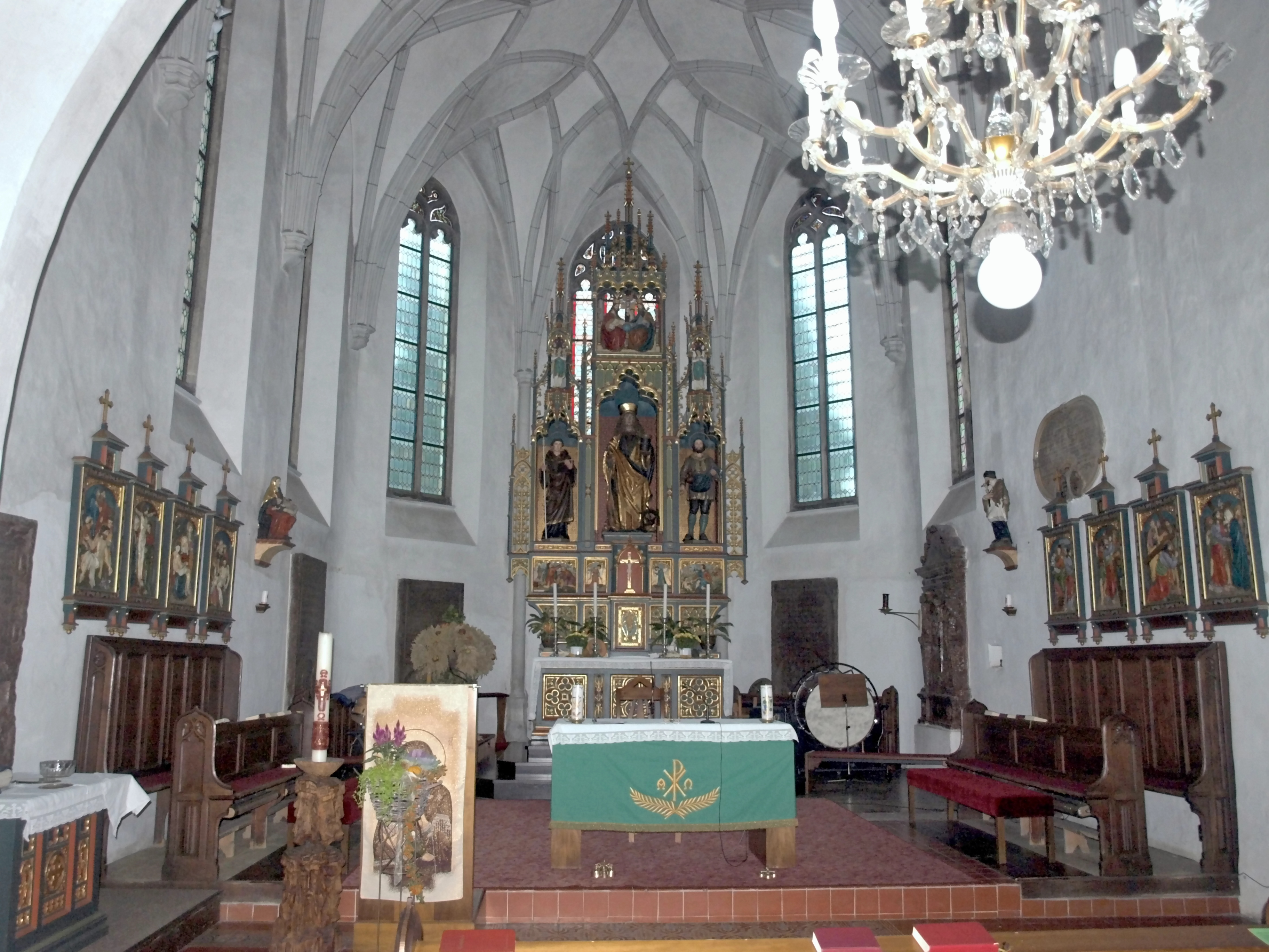 Kath. Pfarrkirche hl. Pantaleon